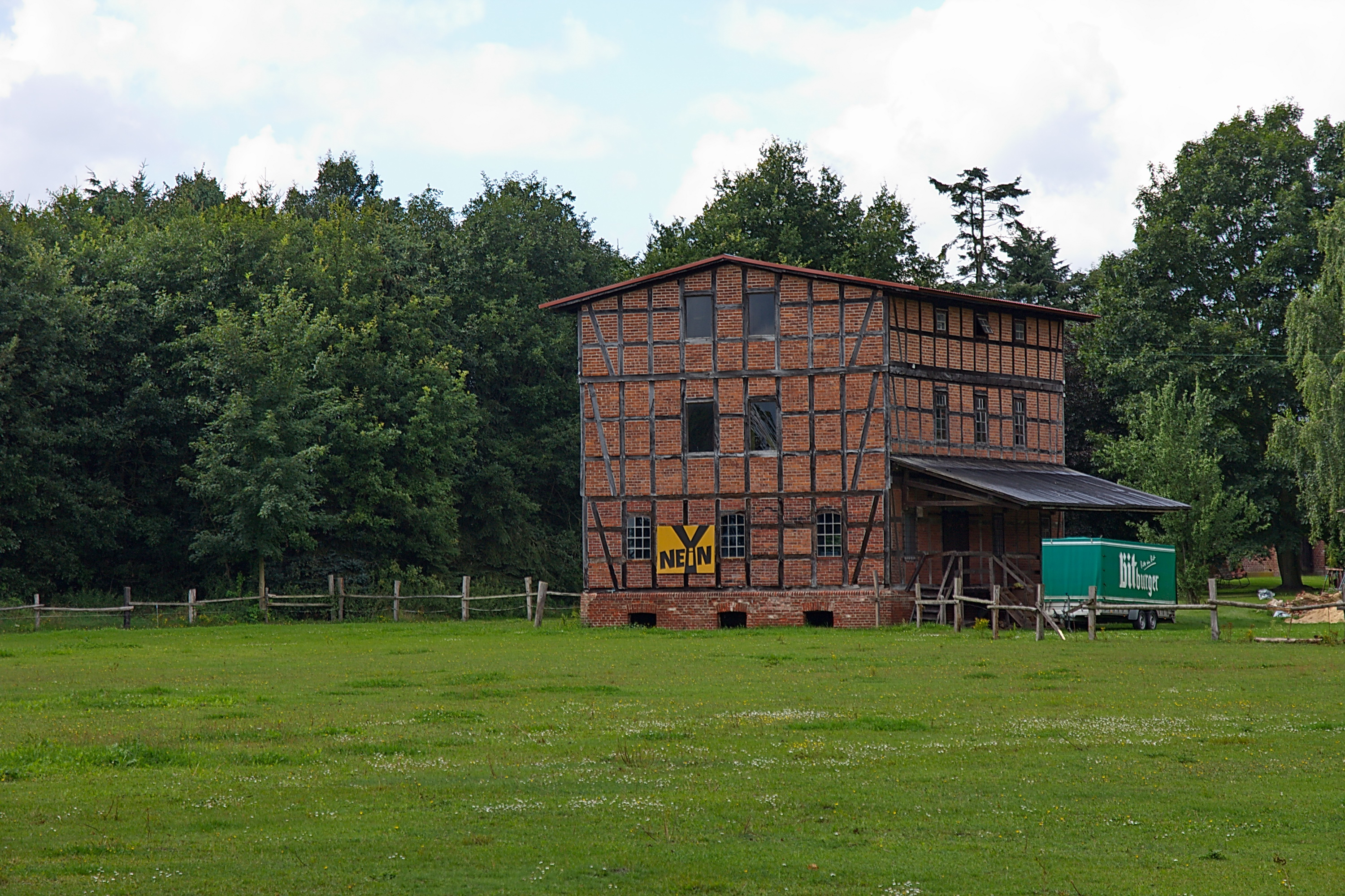 Fachwerkbau in Jeddingen (Visselhövede), Niedersachsen, Deutschland